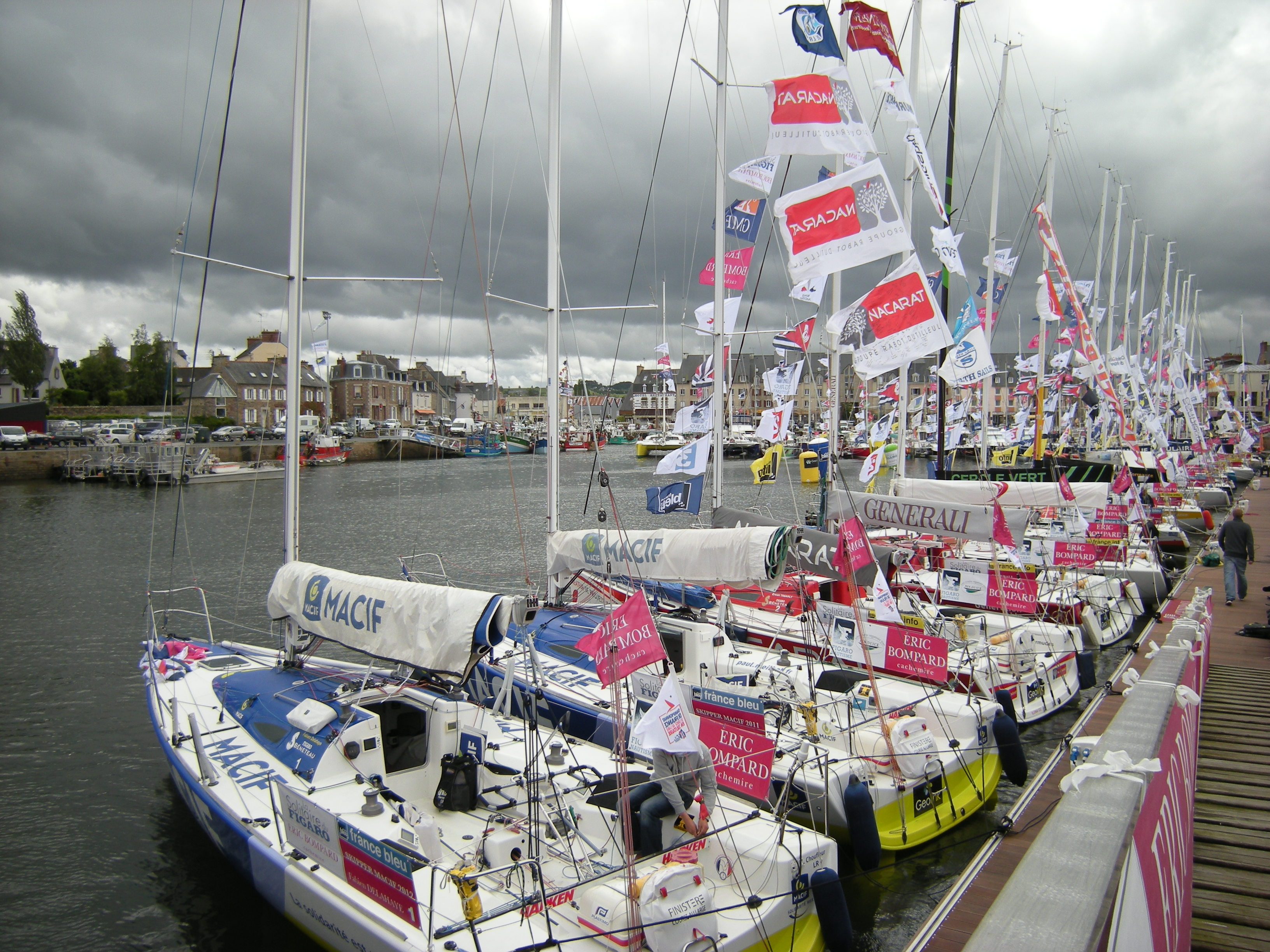 Port de Paimpol avant le départ de la Solitaire du Figaro 2012